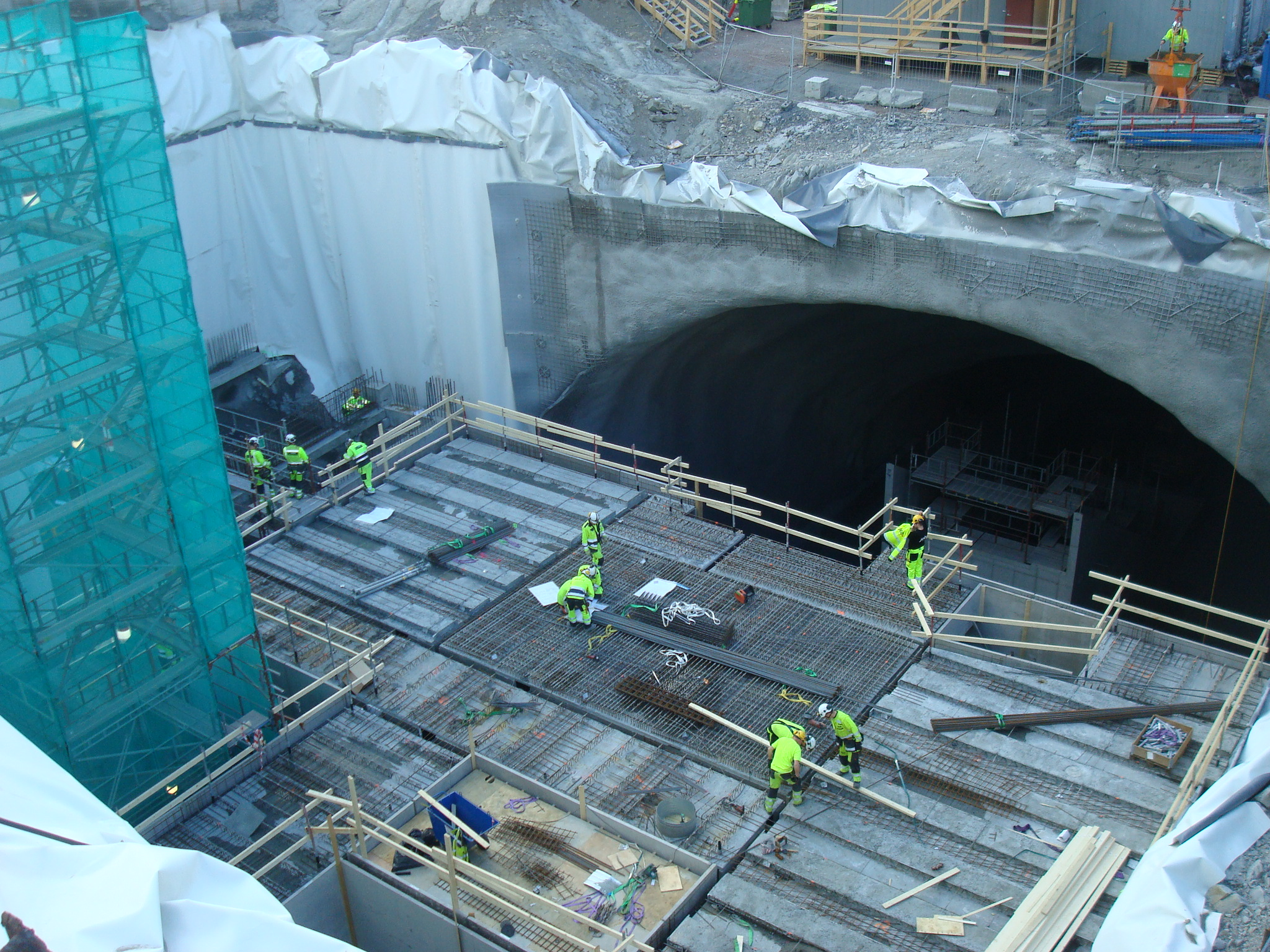 Byggegrop på kommende Løren stasjon i april 2015.